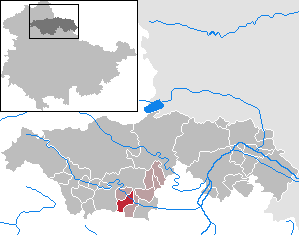 Westgreußen in Thuringia - Kyffhäuserkreis